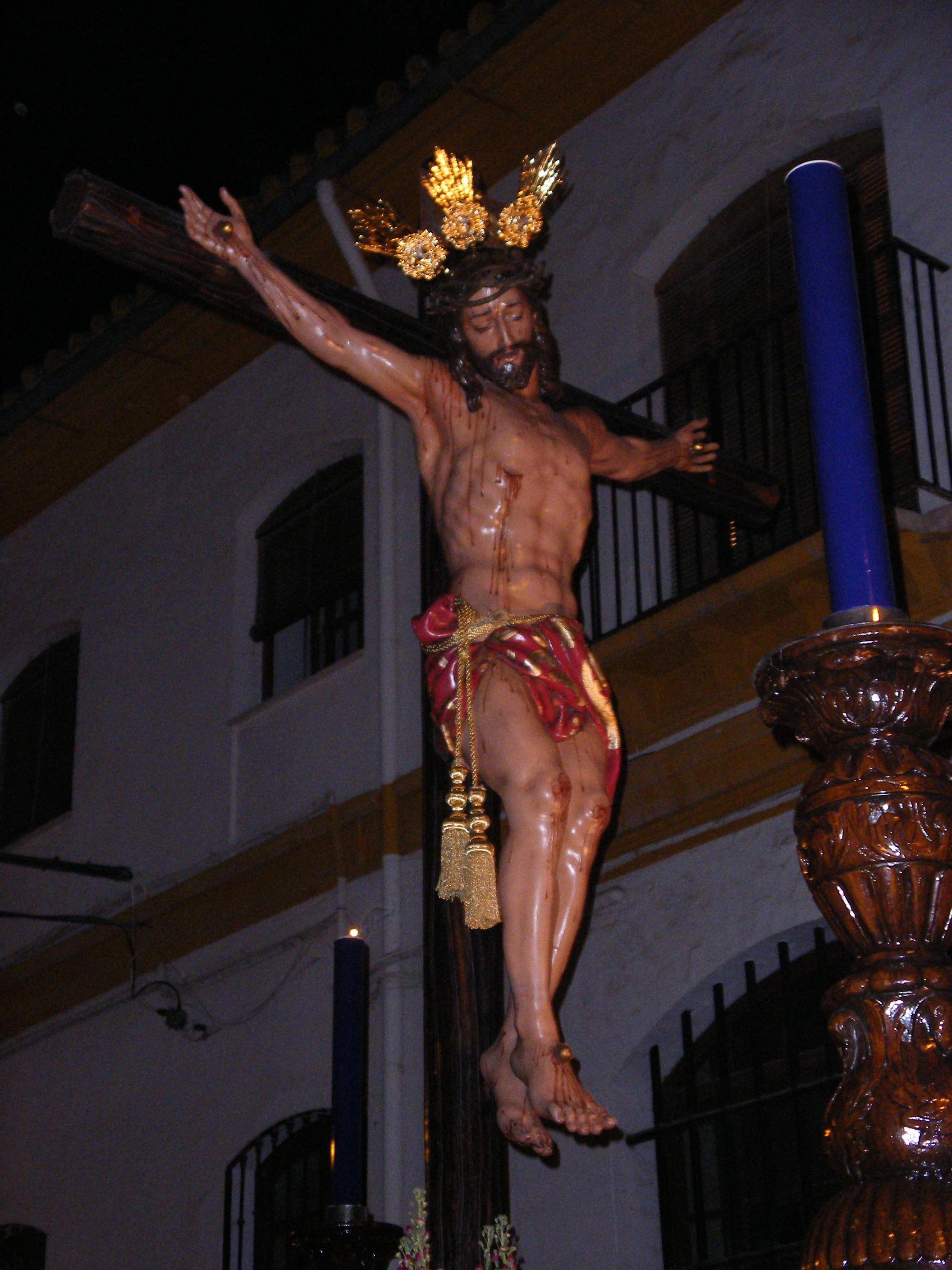 Cristo del Buen Morir en la Procesión del Viernes Santo en Puente Genil (Córdoba, España)